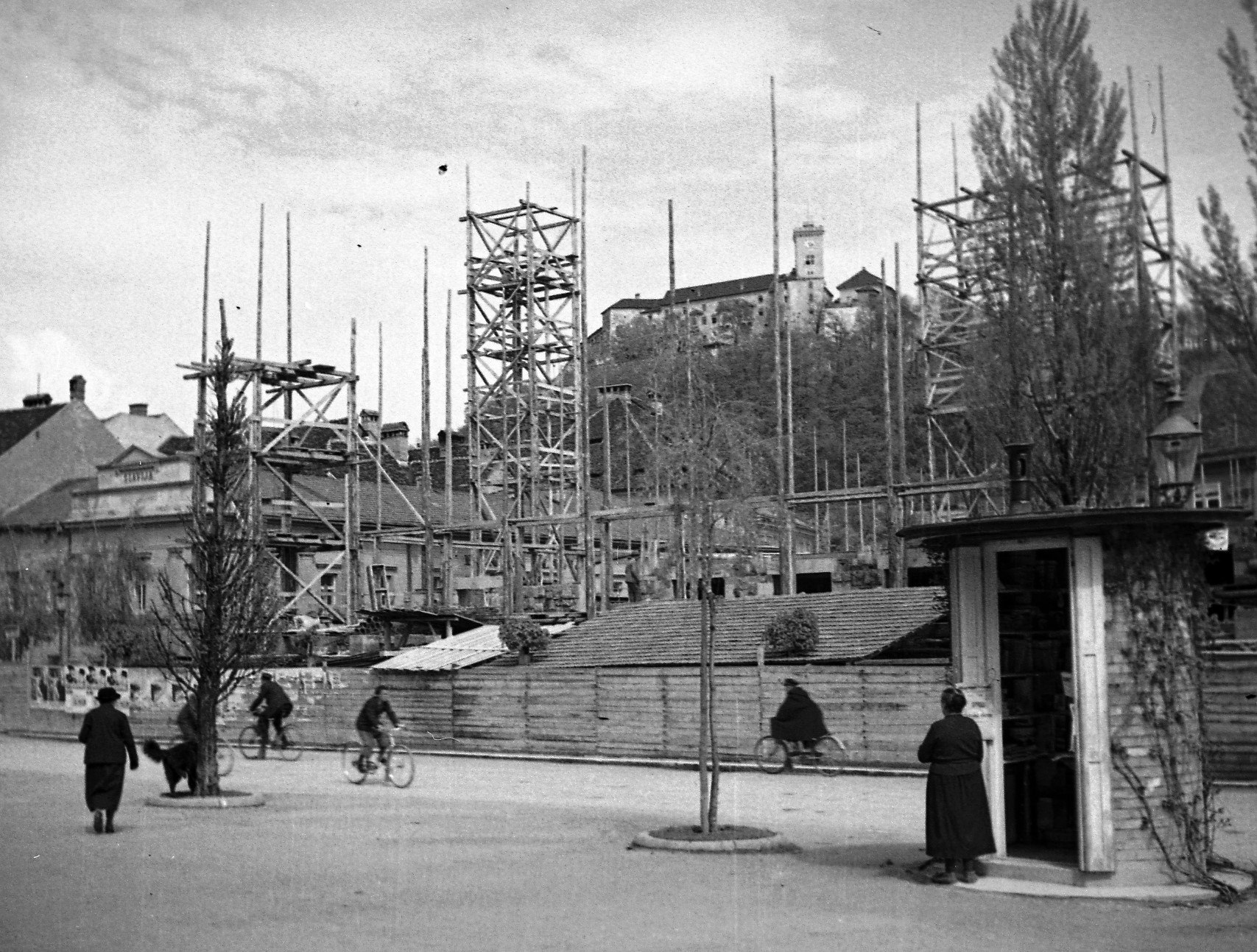 Začetek gradnje Narodne in univerzitetne knjižnice leta 1937.